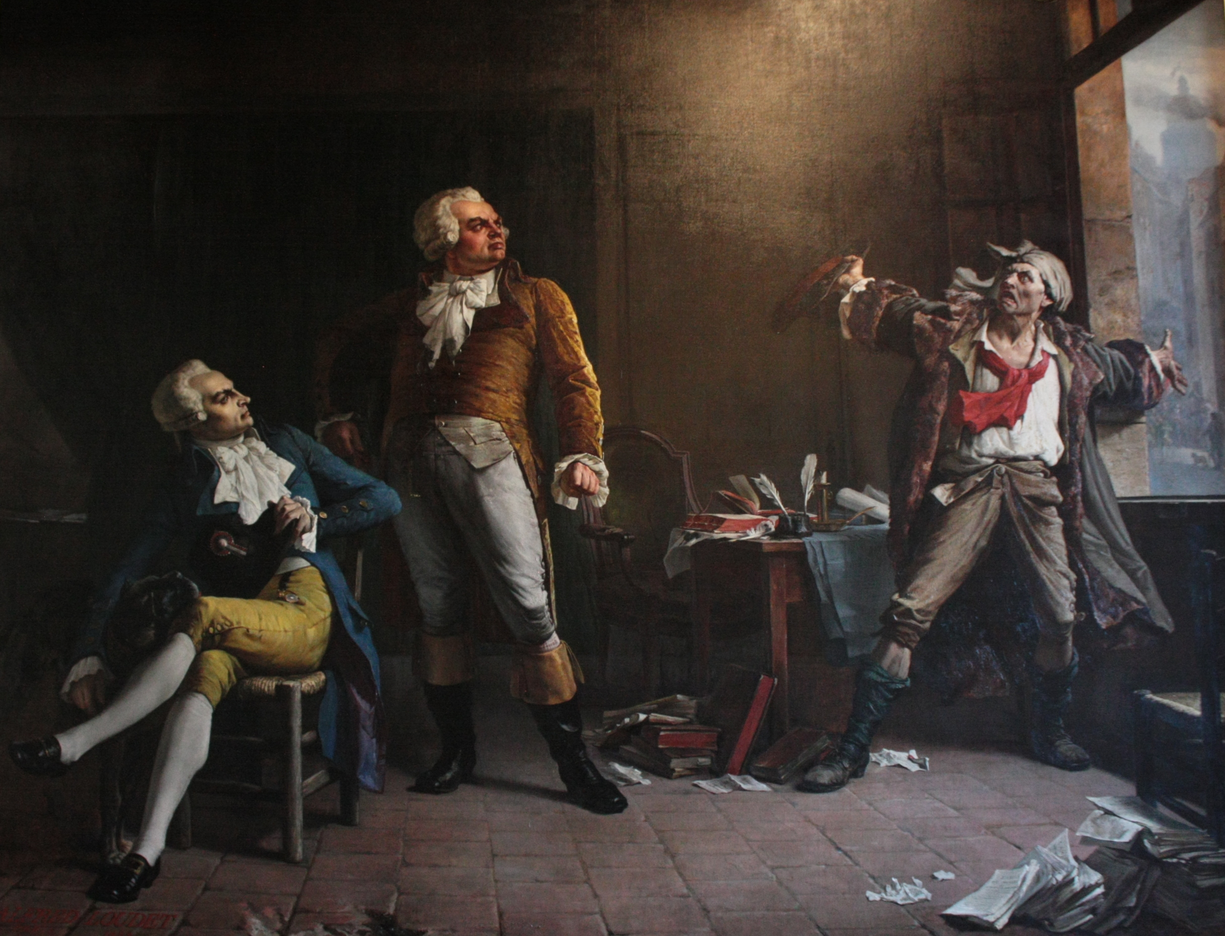 Marat ayant une conversation animée avec Danton (debout) et Robespierre (assis) par Alfred Loudet, 1882